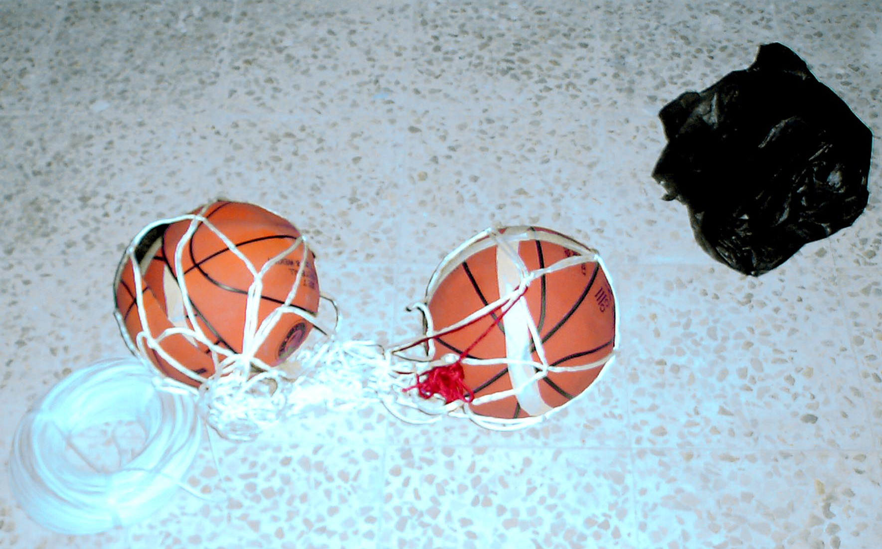 (en) 12/01/2003 During an IDF operation in Ramallah, two explosives labs were found. Inside the labs were TATP explosives, fluids for making bombs, explosive belts and different devices, including two bombs hidden inside basketballs. (ru) Взрывные устройства, спрятанные в баскетбольных мячах, обнаруженных в одной из двух подпольных лабораторий во время операции Армии обороны Израиля в Рамалле 1 декабря 2003 г.